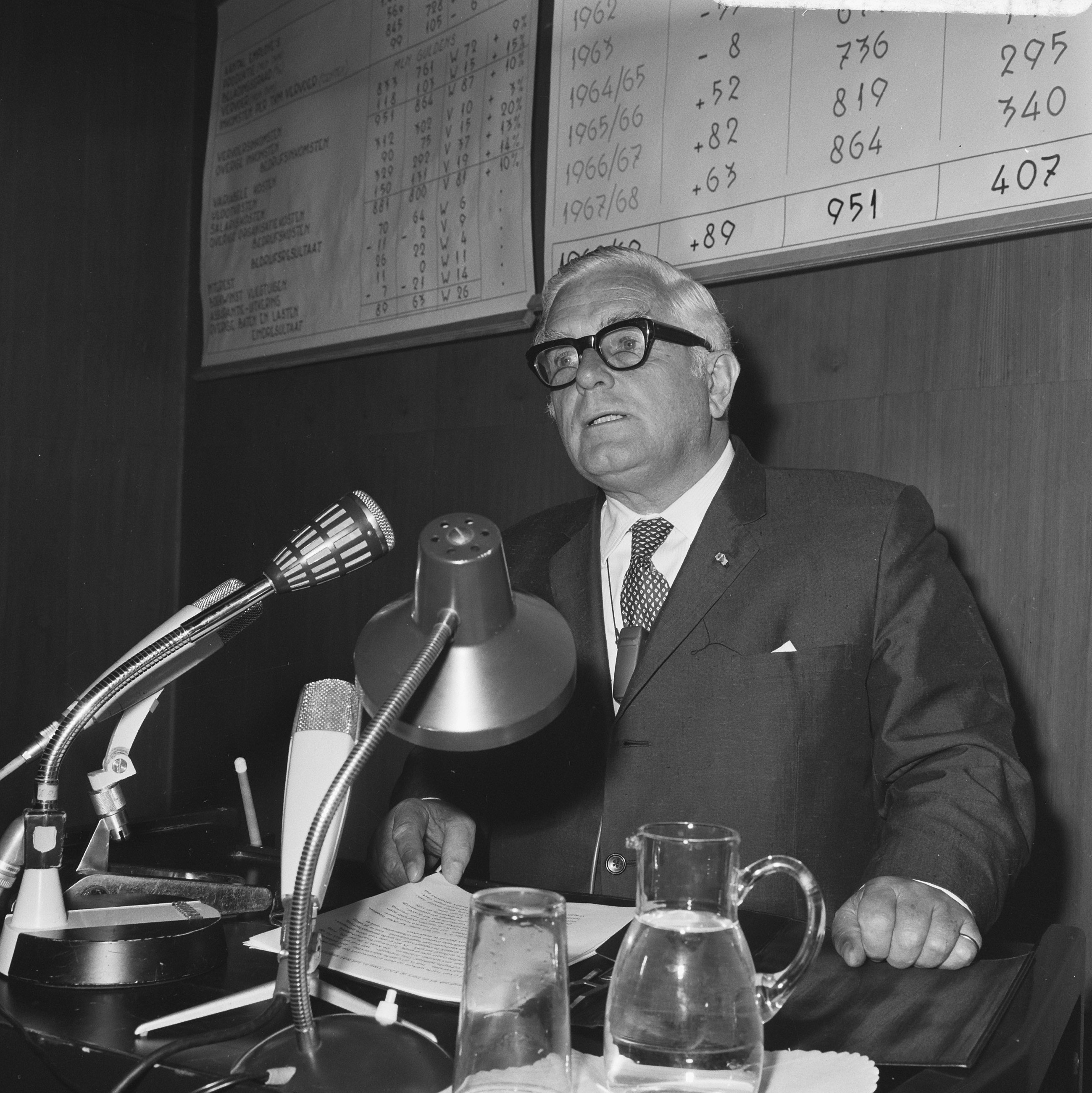 Collectie / Archief : Fotocollectie Anefo Reportage / Serie : President-directeur van de KLM Gerrit van der Wal tijdens een toespraak in de RAI Beschrijving : toespraken, directeuren, luchtvaartmaatschappijen, Wal, G. van der Datum : 8 juli 1969 Locatie : Amsterdam, Noord-Holland Trefwoorden : directeuren, luchtvaartmaatschappijen, toespraken Persoonsnaam : Wal, G. van der Instellingsnaam : RAI Fotograaf : Evers, Joost / Anefo Auteursrechthebbende : Nationaal Archief Materiaalsoort : Negatief (zwart/wit) Nummer archiefinventaris : bekijk toegang 2.24.01.03 Bestanddeelnummer : 922-6072